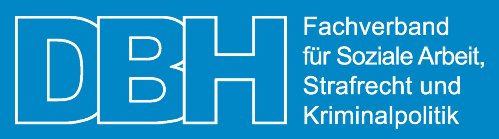 Das Logo steht für den DBH e.V.. DBH ist ein bundesweit und international aktiver Fachverband für Soziale Arbeit, Strafrecht und Kriminalpolitik.